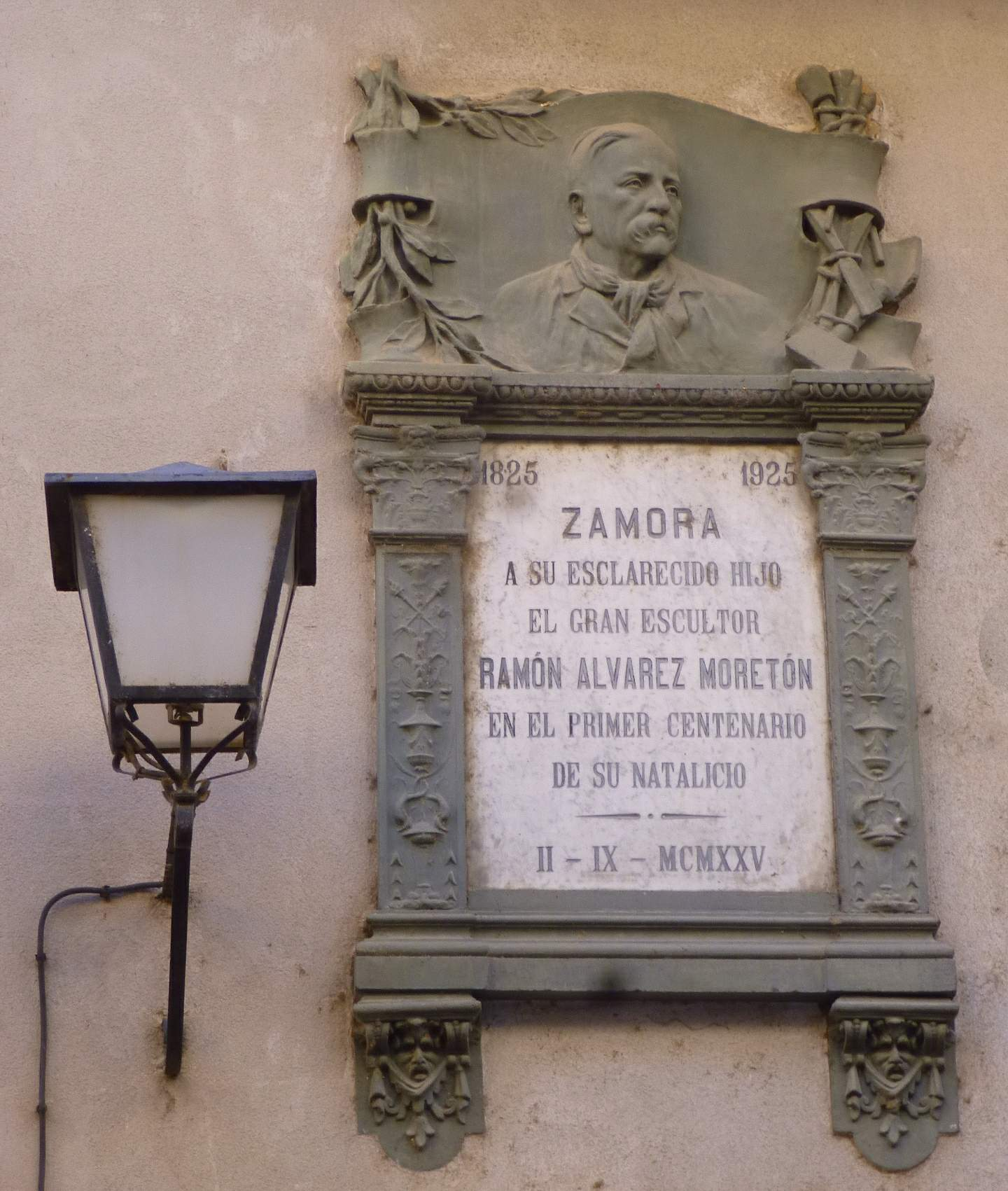 Zamora - Calle de Balborraz, Memorial del imaginero Ramón Álvarez Moretón